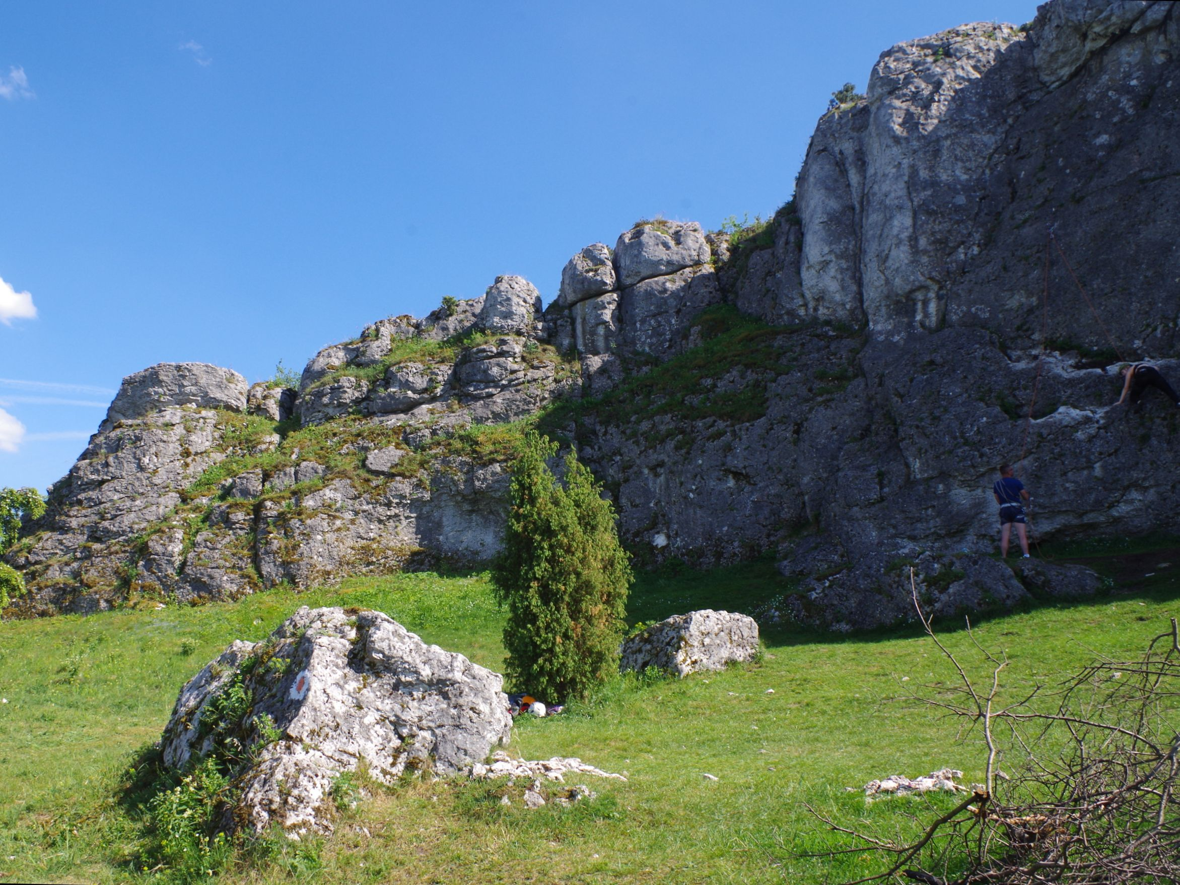 Skały Owczy Mur w Grupie Dziewicy na wzgórzu Cegielnia koło Olsztyna